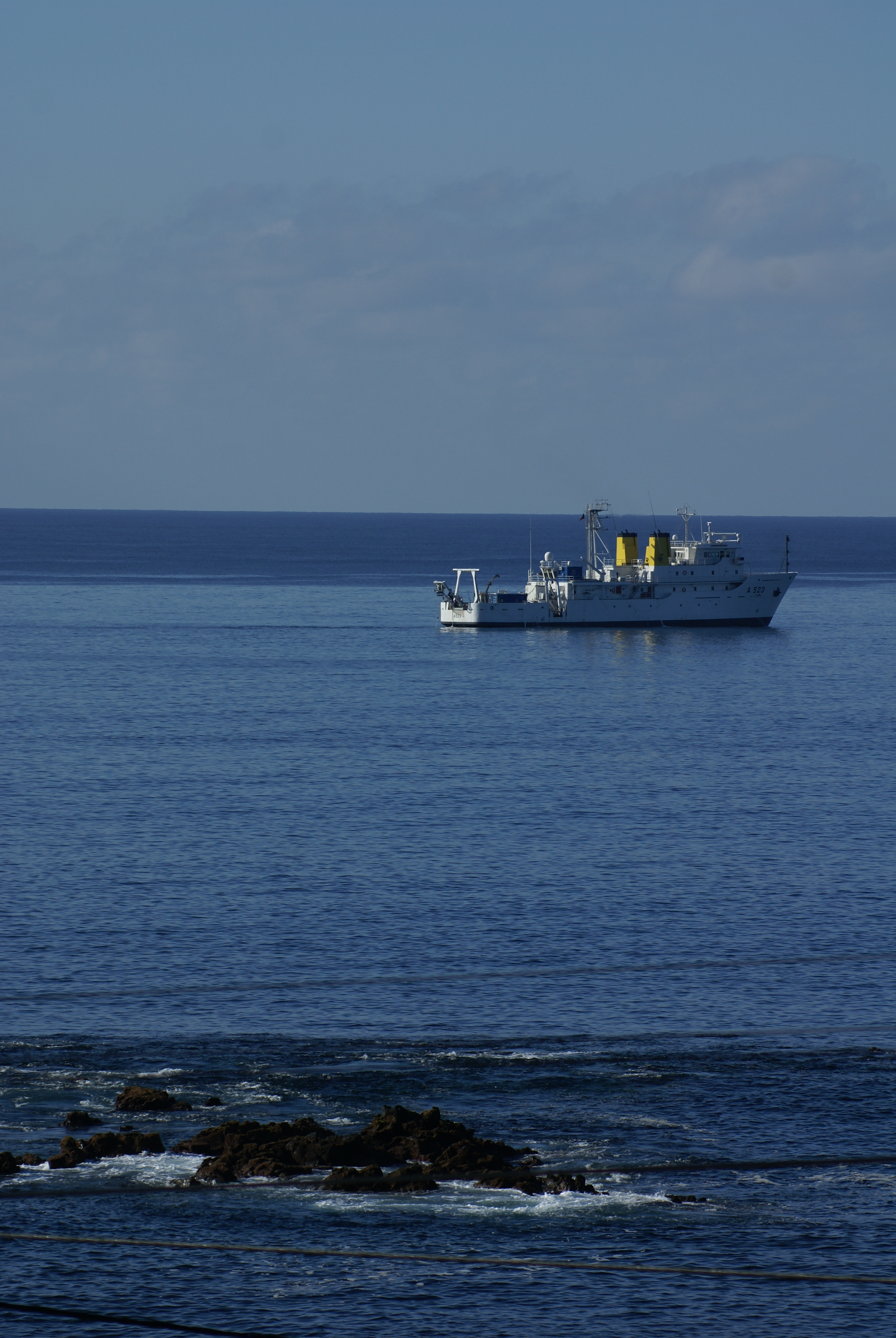 NRP Almirante Gago Coutinho (A-523) na Baía de Villa Maria 1, Arquivo de Villa Maria, ilha Terceira, Açores